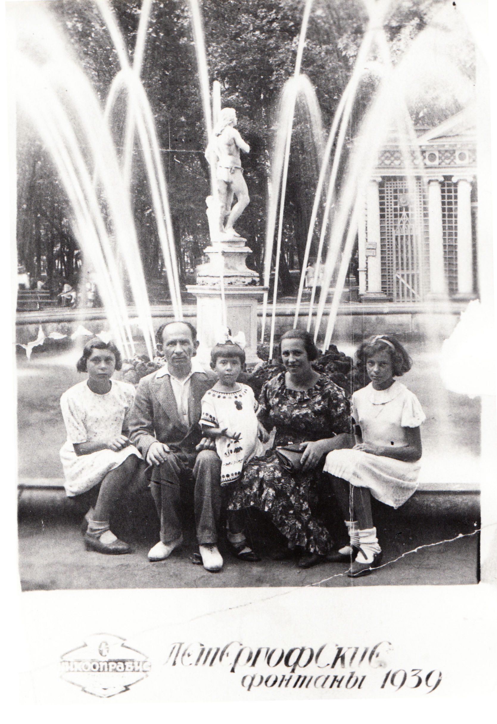 Rodina Želeněcová, sestřenice, otec Samuil (původem z Prahy Libně), Inna, matka Galina (původem z Varšavy, kde se se Samuilem poznali), sestra Tamara, Leningrad 1939